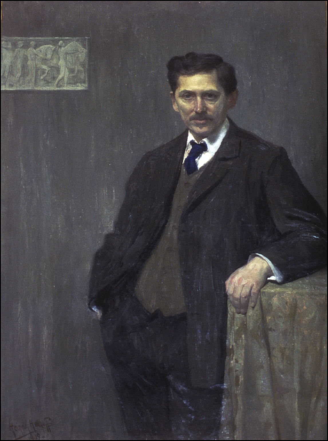 Porträt Wilhelm Wandschneider von Heinrich Hellhoff